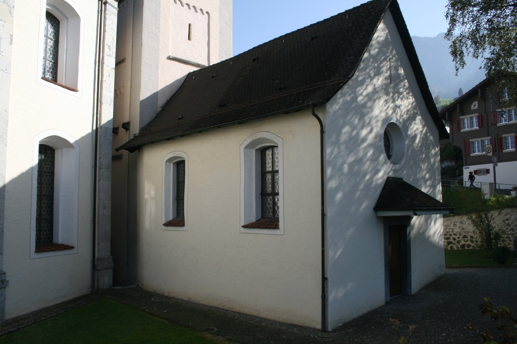 Grabkapelle in Sachseln bei der Pfarr- und Wallfahrtskirche Sachseln, Obwalden, Schweiz